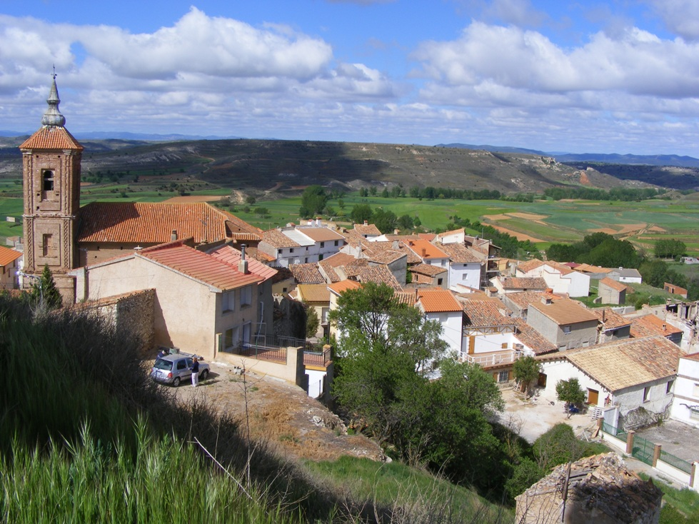 Panorama di Cutanda